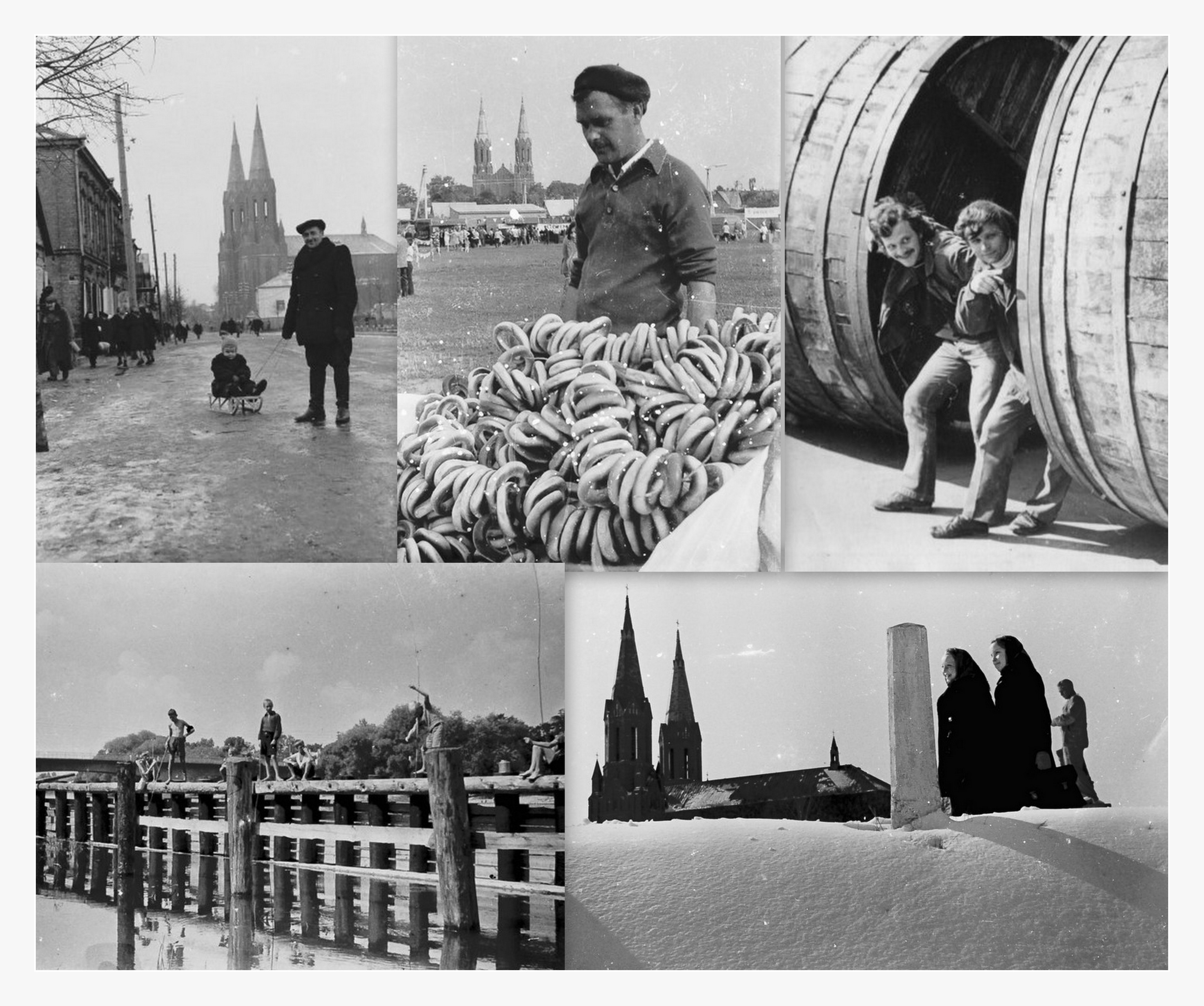 Izidoriaus Girčio keletas fotografijų jo biografijos aprašui.